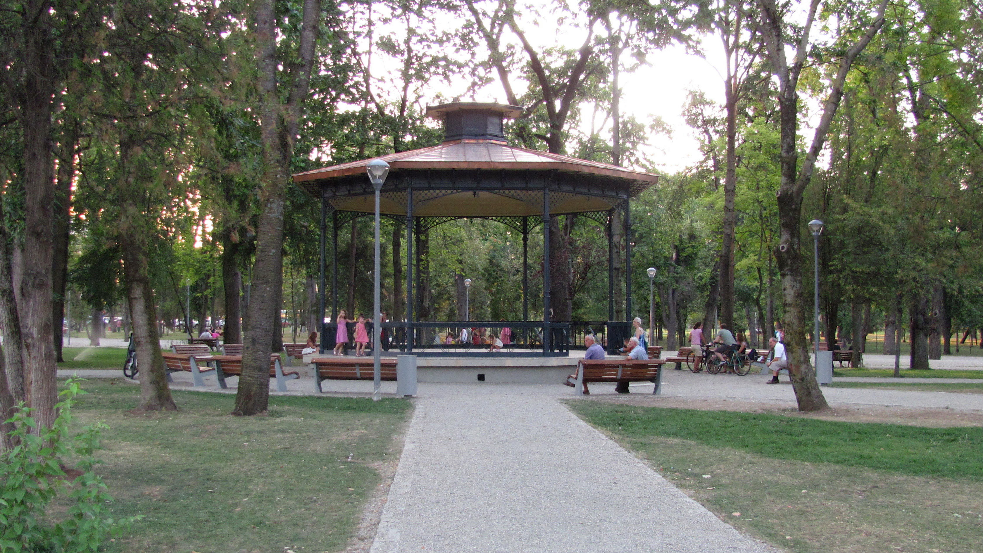 Cluj-Napoca - Parcul Simion-Bărnuțiu - Pavilion de vară 03